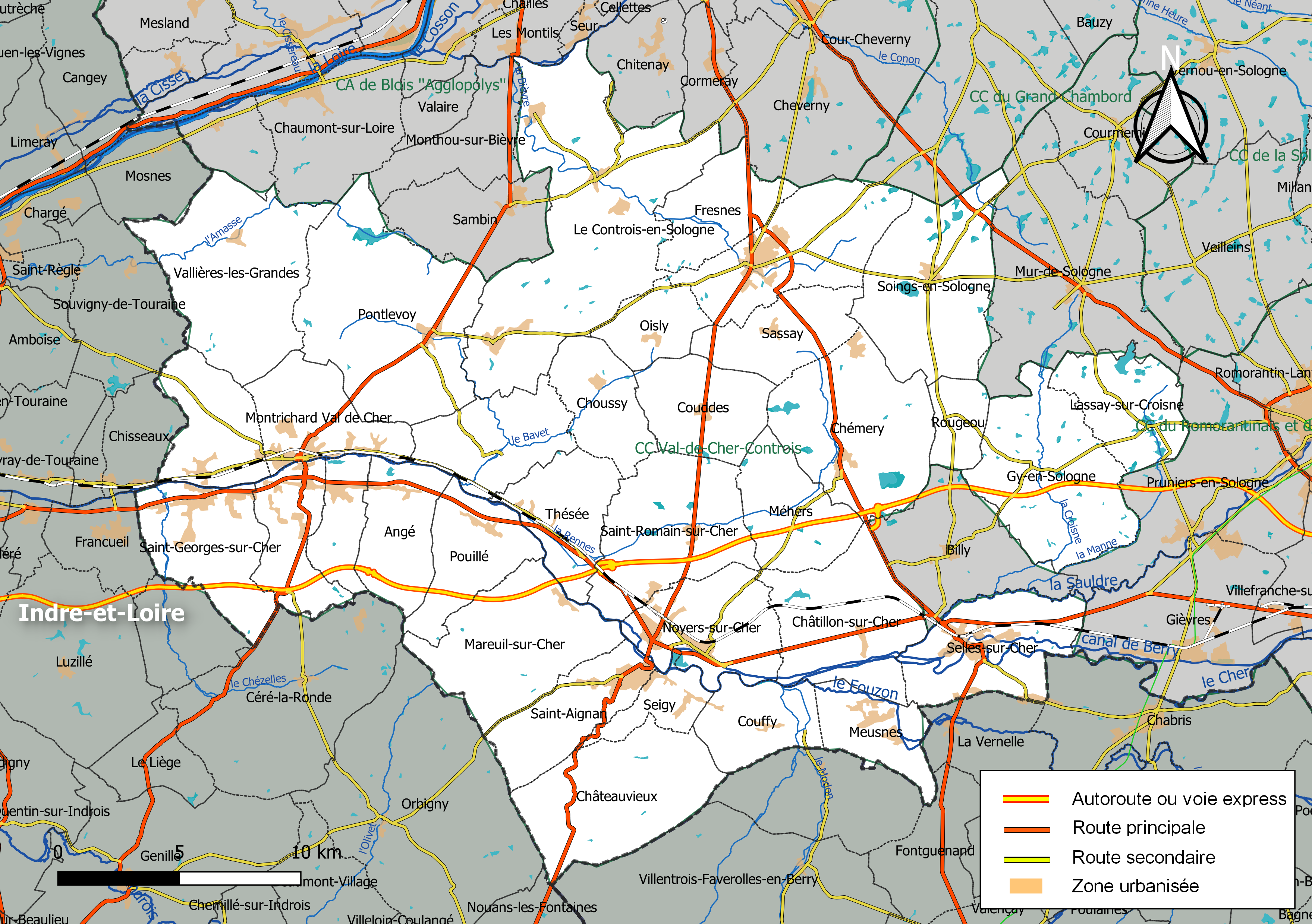 Carte de la communauté de communes Val-de-Cher-Controis, département de Loir-et-Cher, France. Composition au 1er janvier 2019.